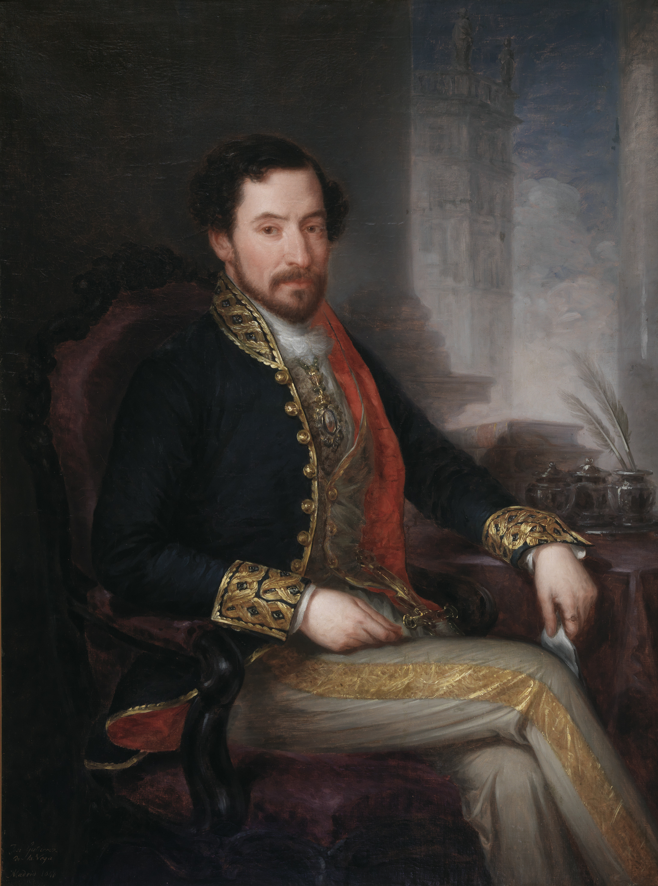 Retrato del político español Nicomedes Pastor Díaz (1811-1863).